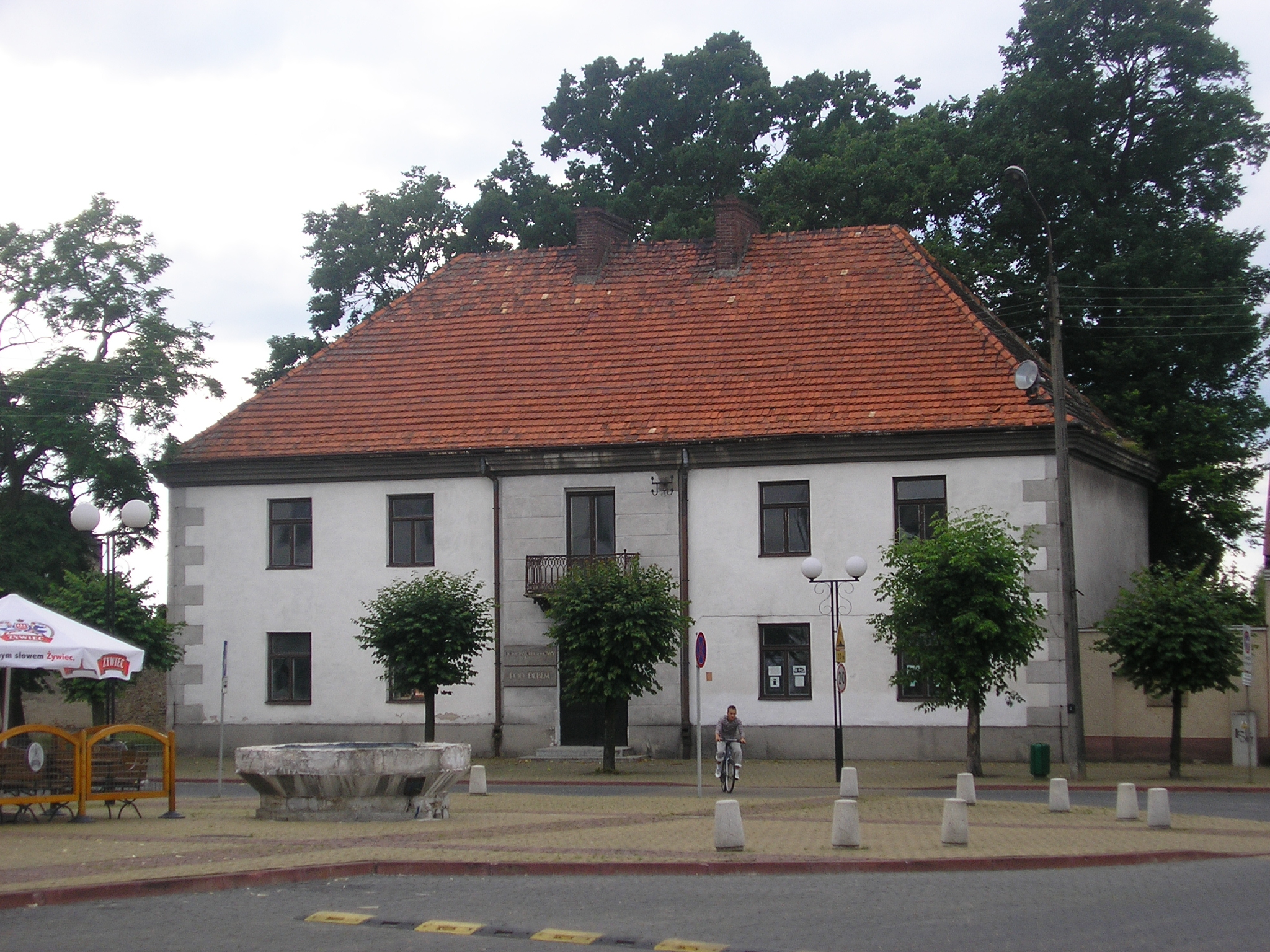 Szydłowiec, Rynek 5 - dawna szkoła, 1819 (zabytek nr 452/A)